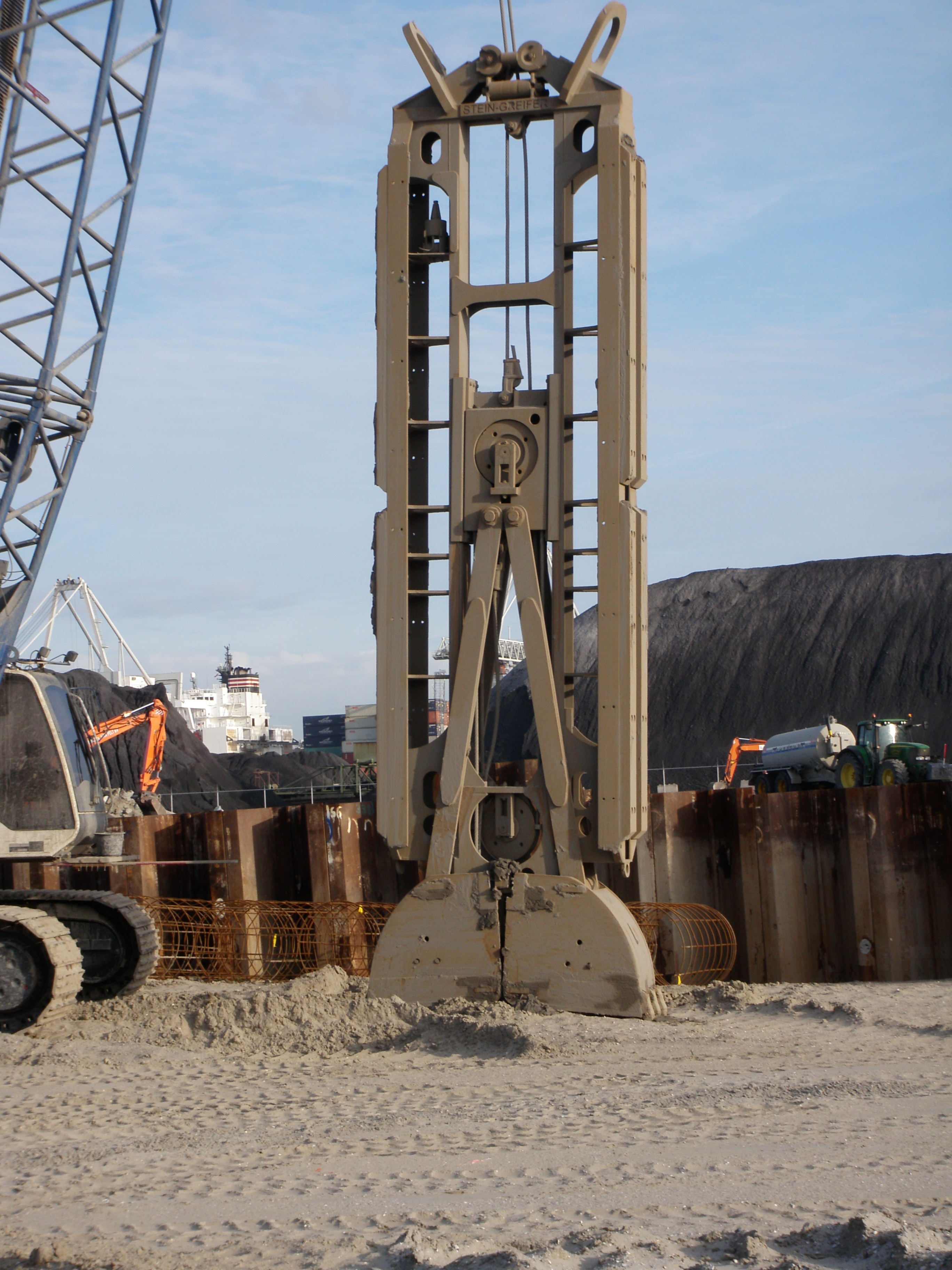 Schlitzwandgreifer Baustelle Kraftwerk Rotterdam